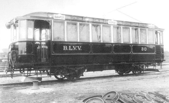 A Budapest-Szentlőrinci Helyiérdekű Villamos Vasút (BLVV) 30-as pályaszámú motorkocsija az 1910-es években